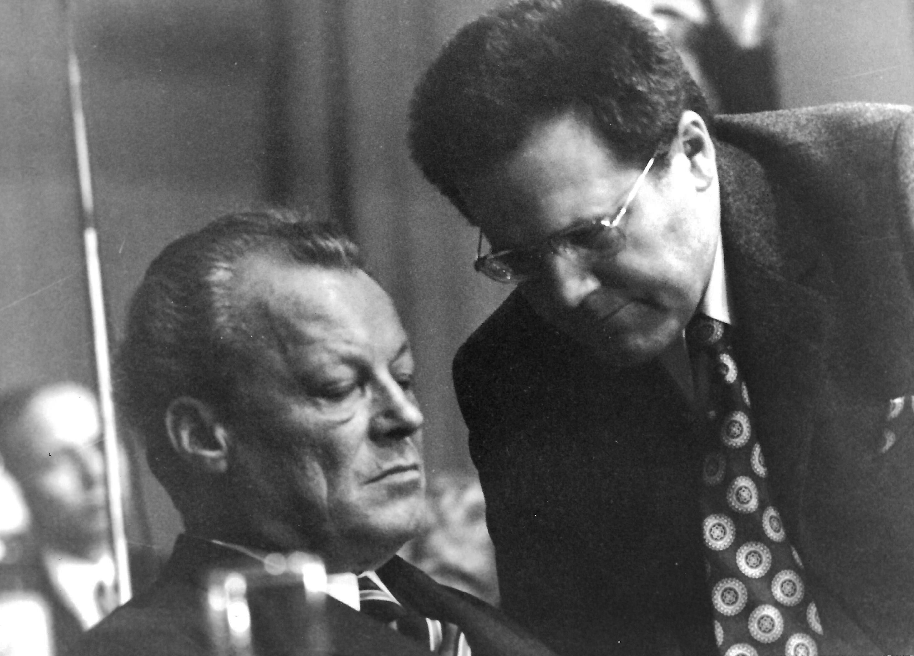 Willy Brandt und Günter Guillaume bei einem Parteitag zwischen 1970 und 1974 in Düsseldorf